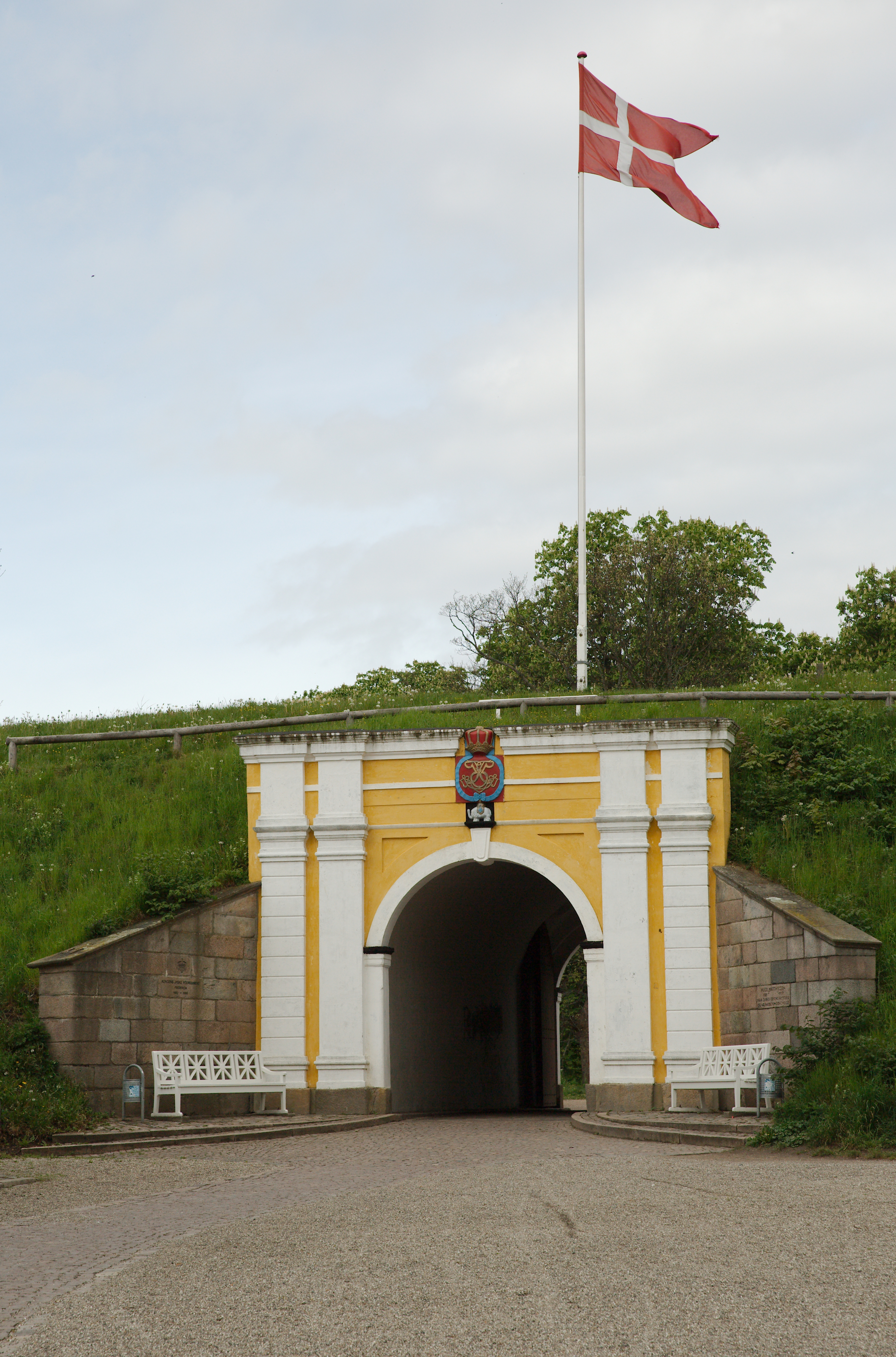 Prinsens Port set fra indersiden af voldene